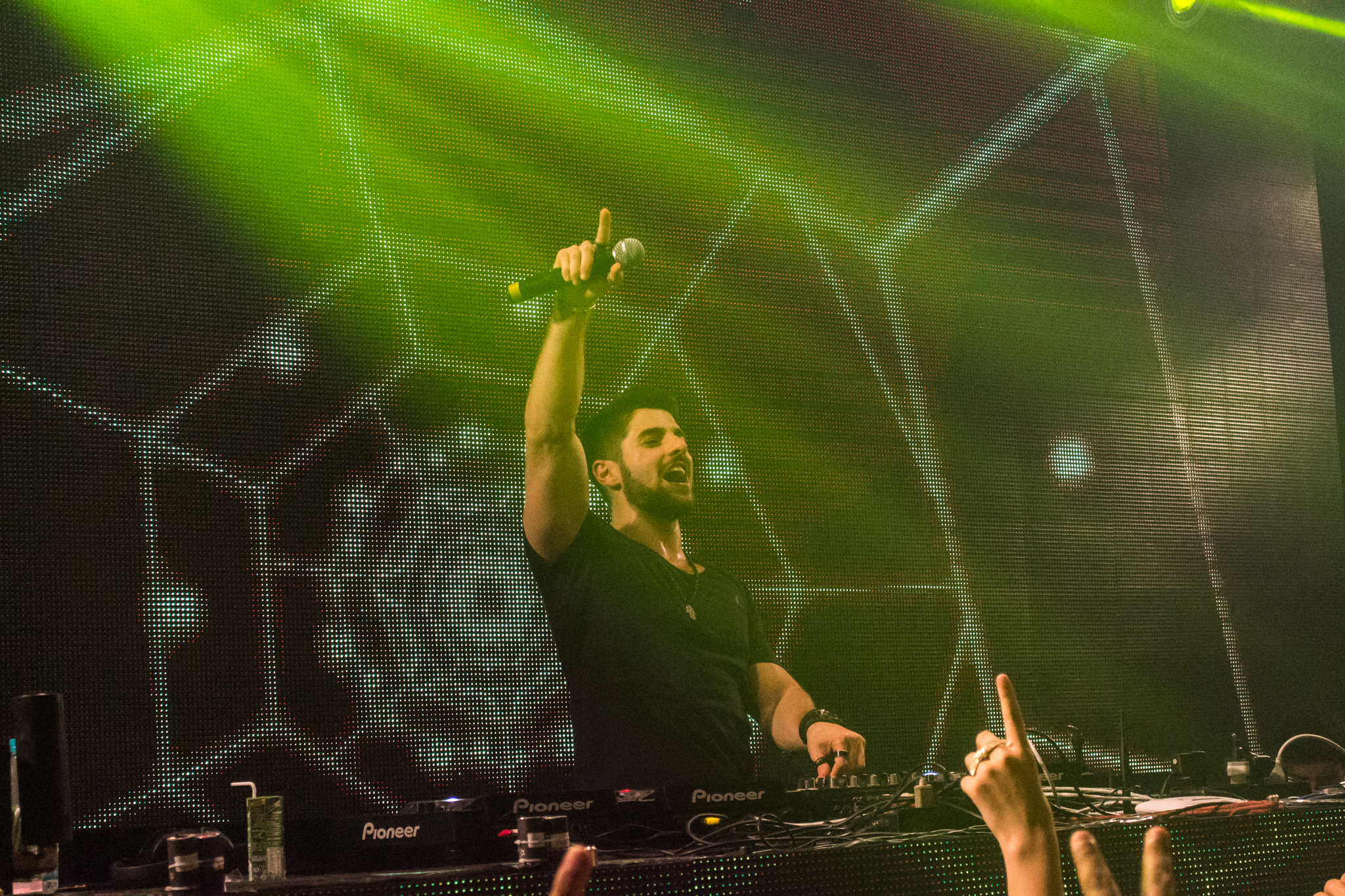 Alok no Lounge 037, Pará de Minas, Minas Gerais.